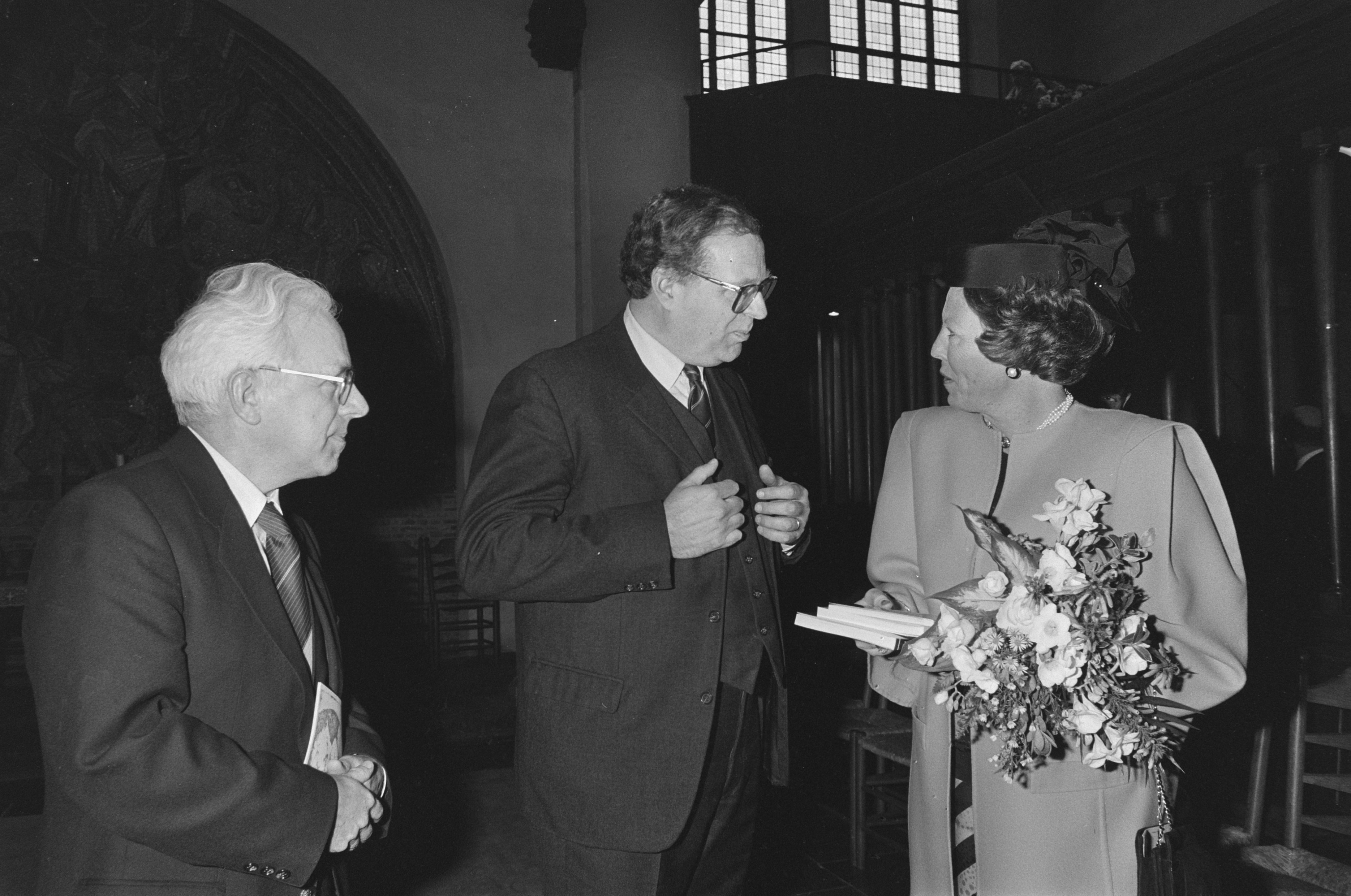 Koningin Beatrix bij Huygensherdenking in Den Haag ; prof. Wesseling (Maatschappij der Nederlandse Letterkunde) overhandigt Hare Majesteit enkele publikaties (o.a.Constanter), links prof. Leendert Strengholt. 28 maart 1987